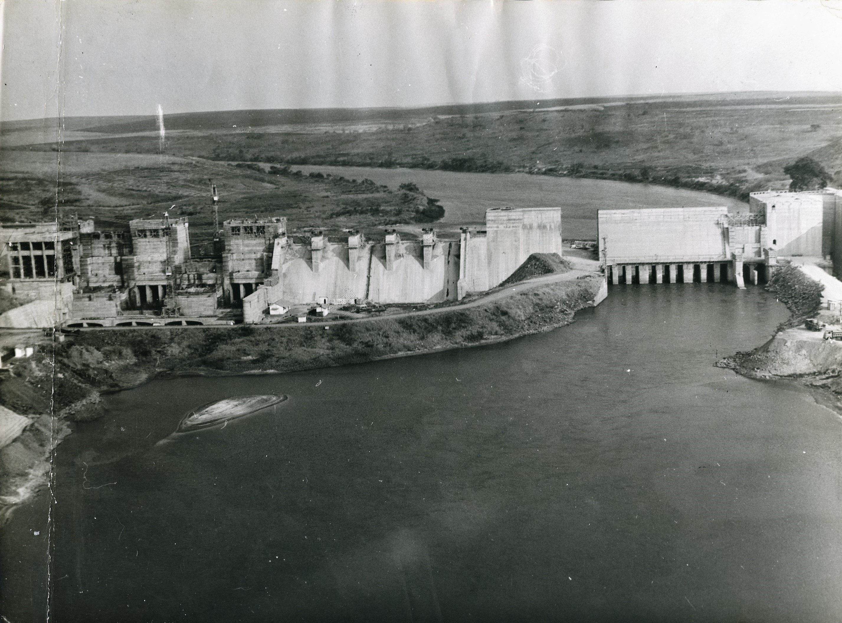 Fotografia do Fundo Correio da Manhã, sob a guarda do Arquivo Nacional.